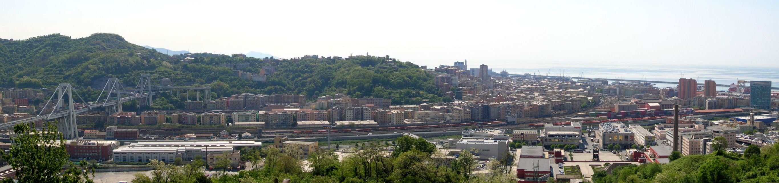 Veduta della bassa Valpolcevera dalla collina di Coronata, a Genova.